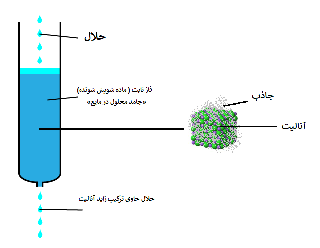 تشریح فرایند شویش در ستون کروماتوگرافی